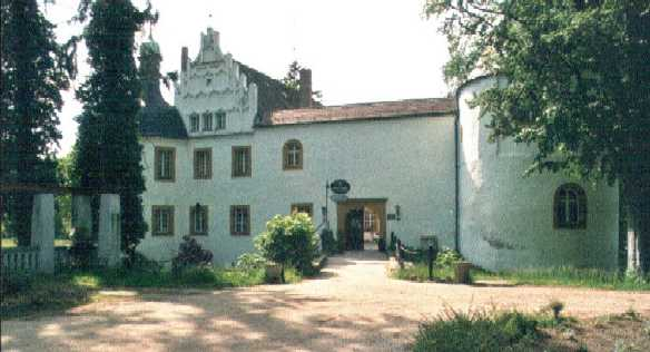 Schloss Sallgast - Torflügel